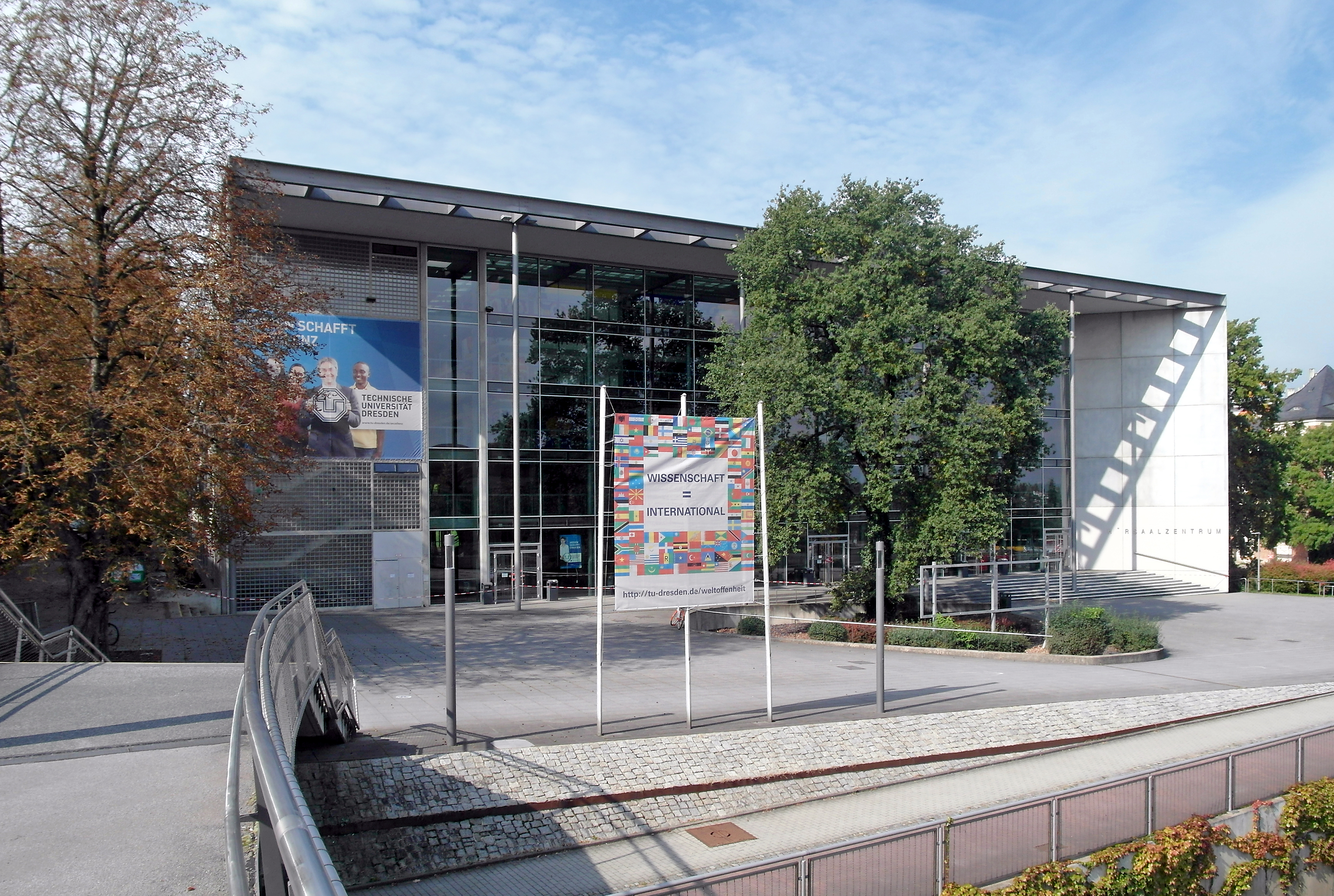 23.09.2017 01069 Dresden-Südvorstadt, Bergstraße 64 (GMP: 51.028798,13.730019) : Hörsaalzentrum der TU Dresden. Architekten Klein & Sänger zusammen mit Dömges + Partner. 1998 fertiggestellt. Sicht von Südosten. [SAM2092.JPG]20170923305DR.JPG(c)Blobelt